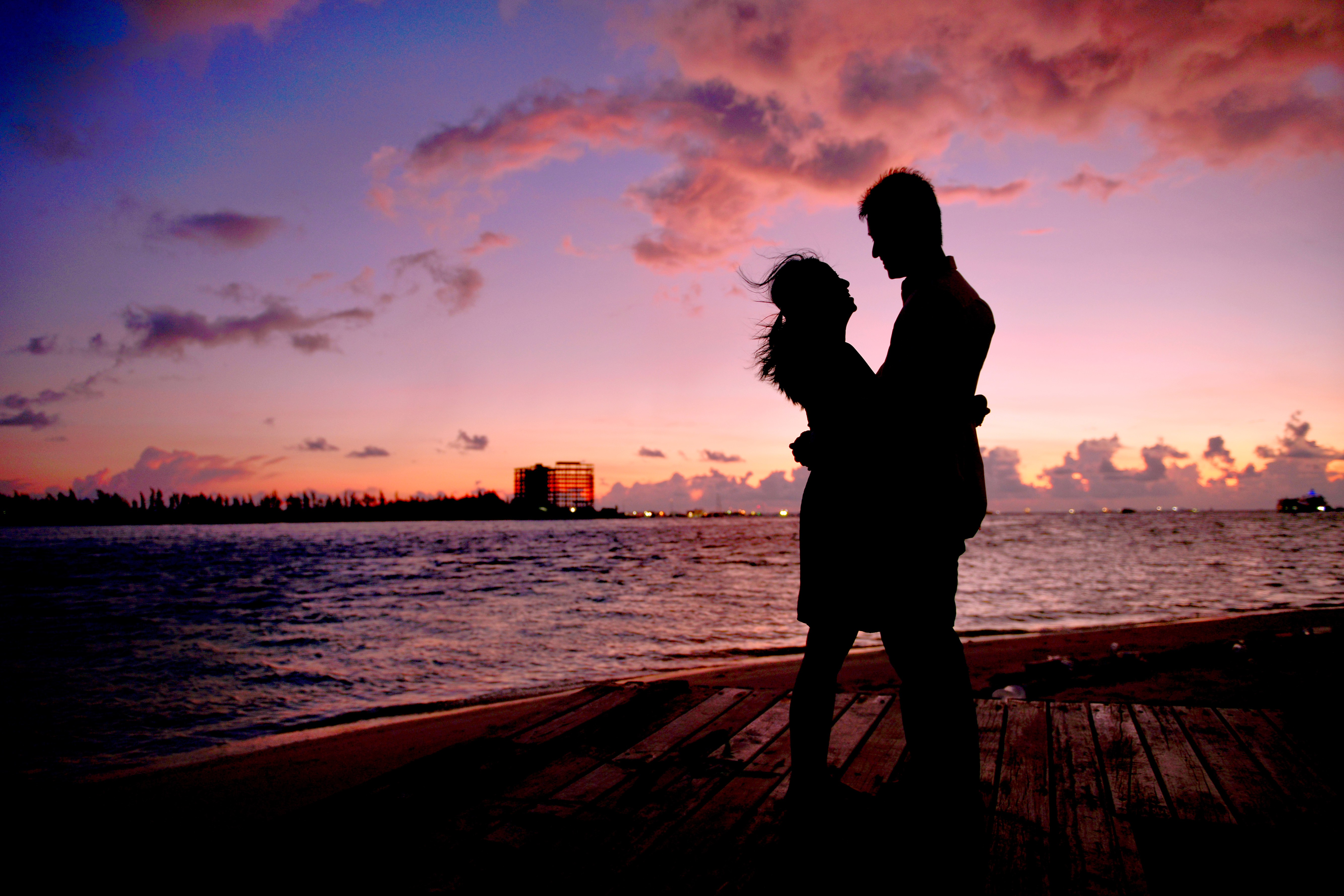 Romantic sunset Couple romance